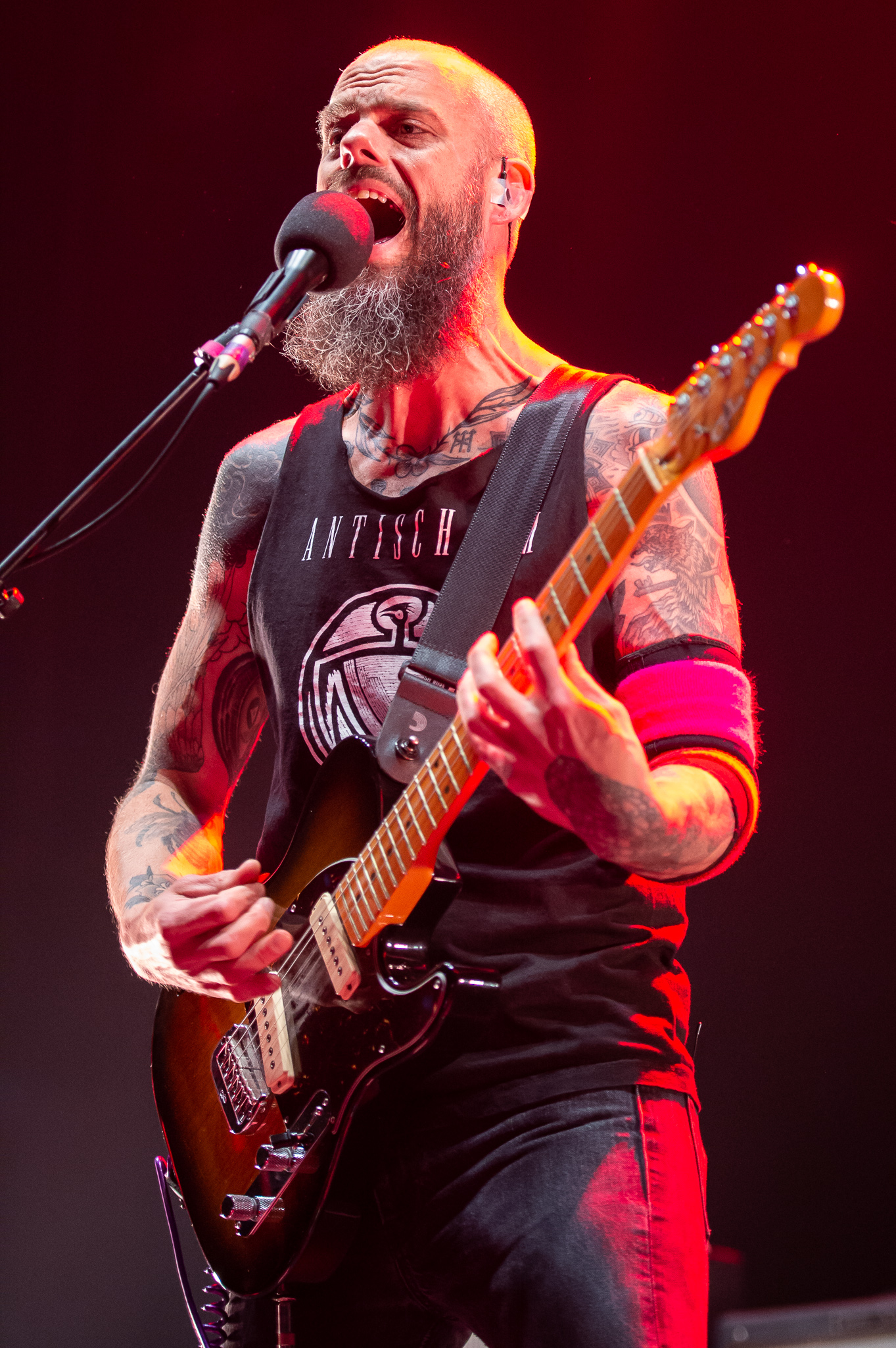 ARGO-Konzerte,Alternarena,Baroness,Festival,John Baizley,Konzert,Livekonzert,Livemusik,Musik,RiP,Rock im Park 2018